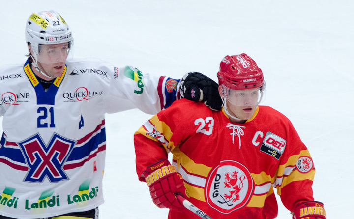 Düsseldorfer EG VS. EHC Biel